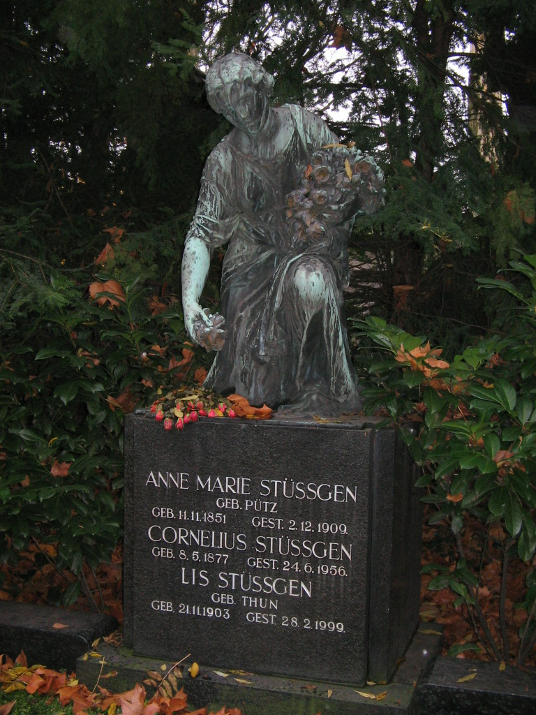 Grabstein für Cornelius Stüssgen, Gründer der Stüssgen-Supermarktkette, auf dem Melaten-Friedhof in Köln